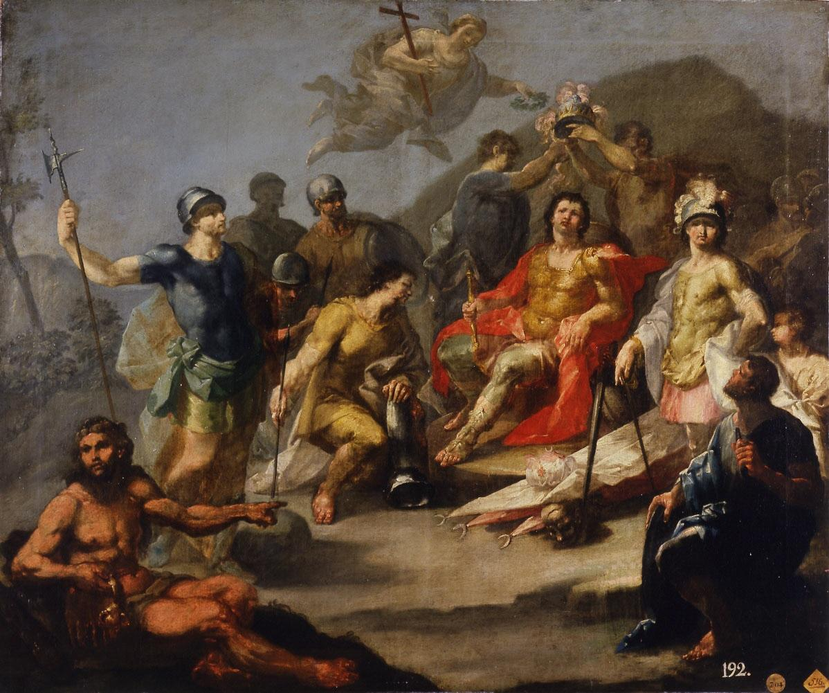 La obra representa la proclamación de Don Pelayo († 737) como rey de Asturias.